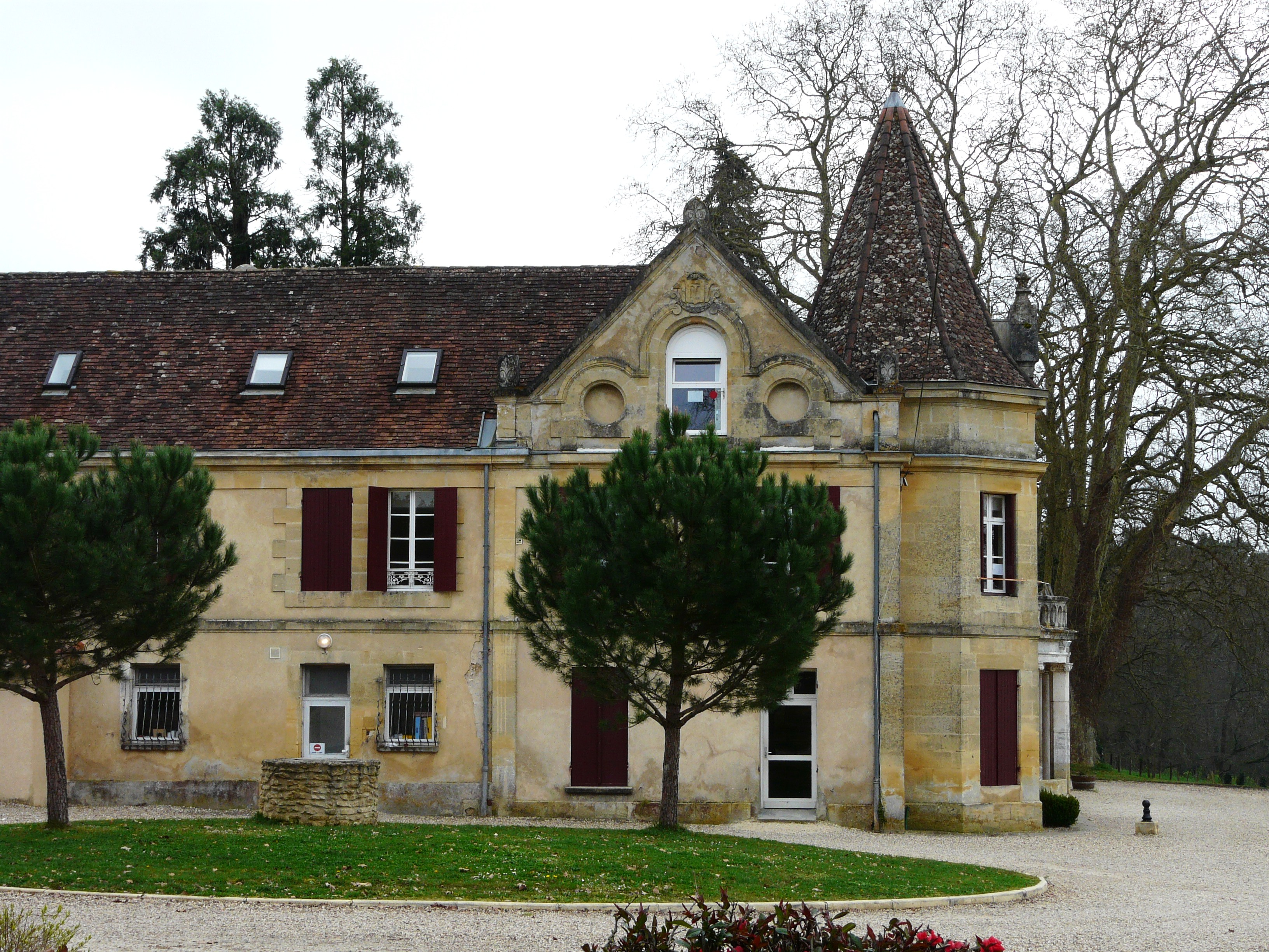 Le château du Roc, Creysse, Dordogne, France.